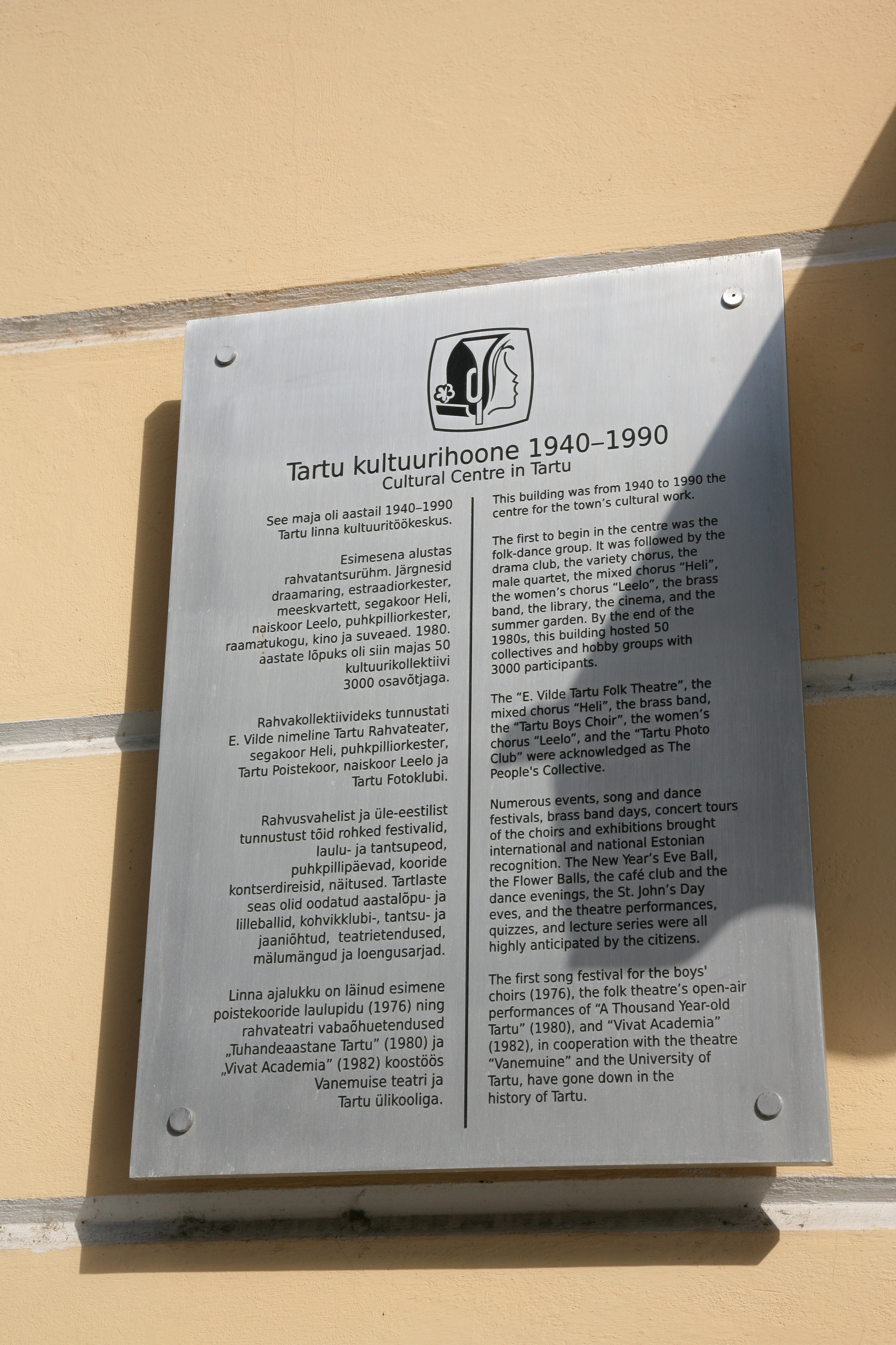 Tartu kultuurihoone mälestustahvel. 4. august 2015